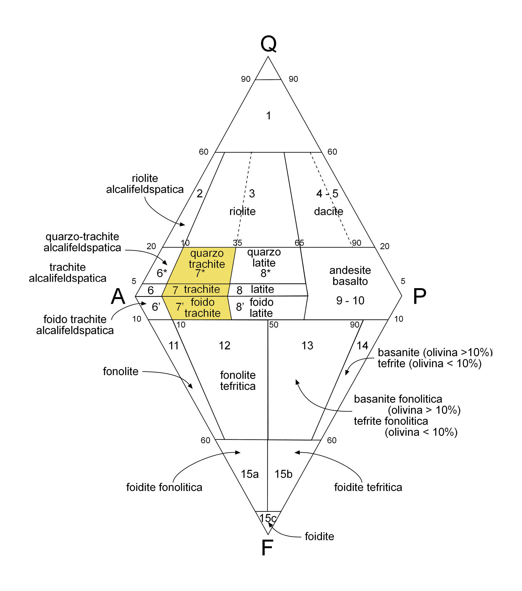 Posizione delle trachiti nel doppio triangolo QAPF